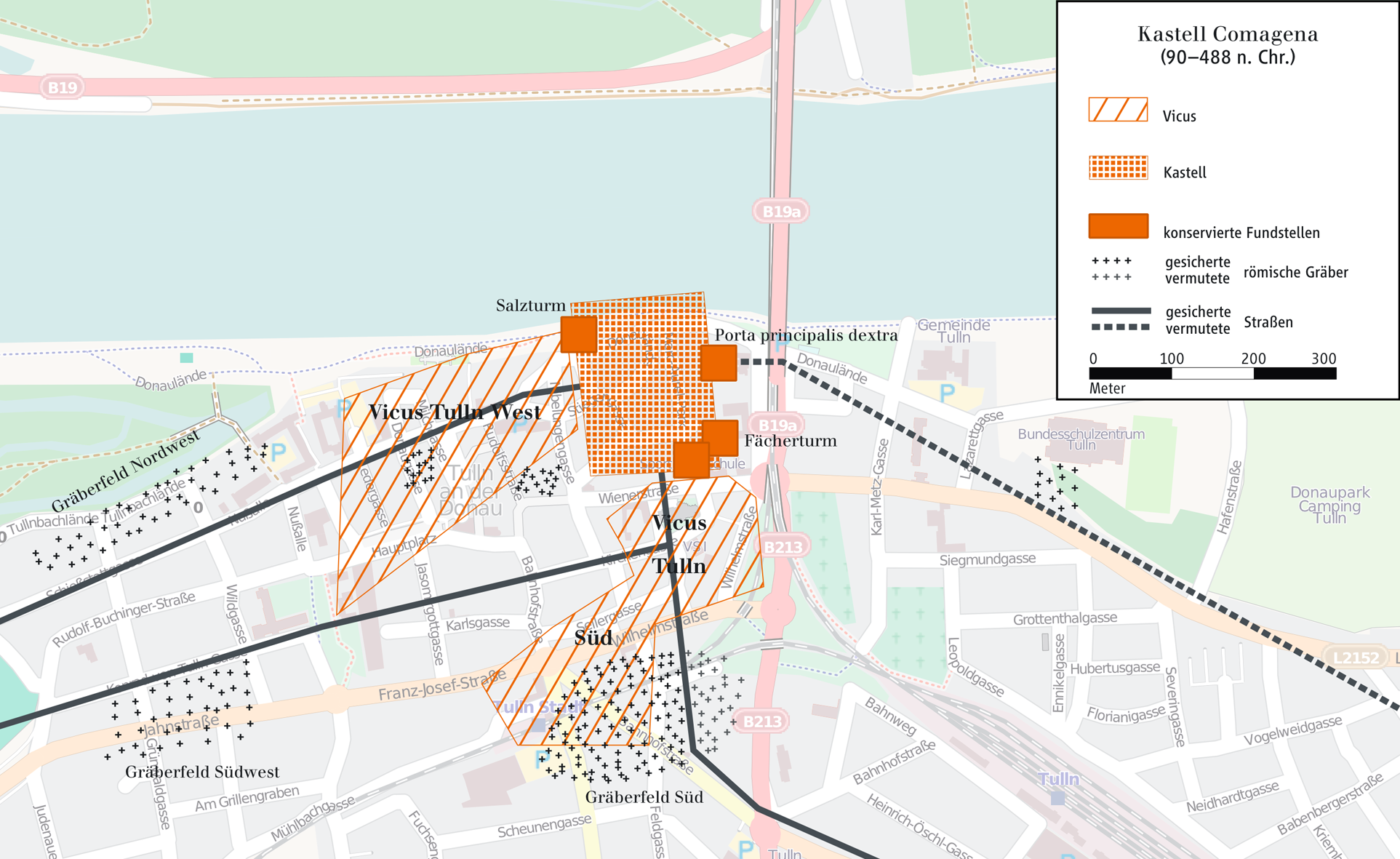 Das Kastell Comagena (Rekonstruktion)